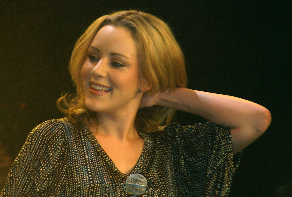 Jasmin Wagner („Blümchen“) beim Benefiz-Konzert Cover me in Köln